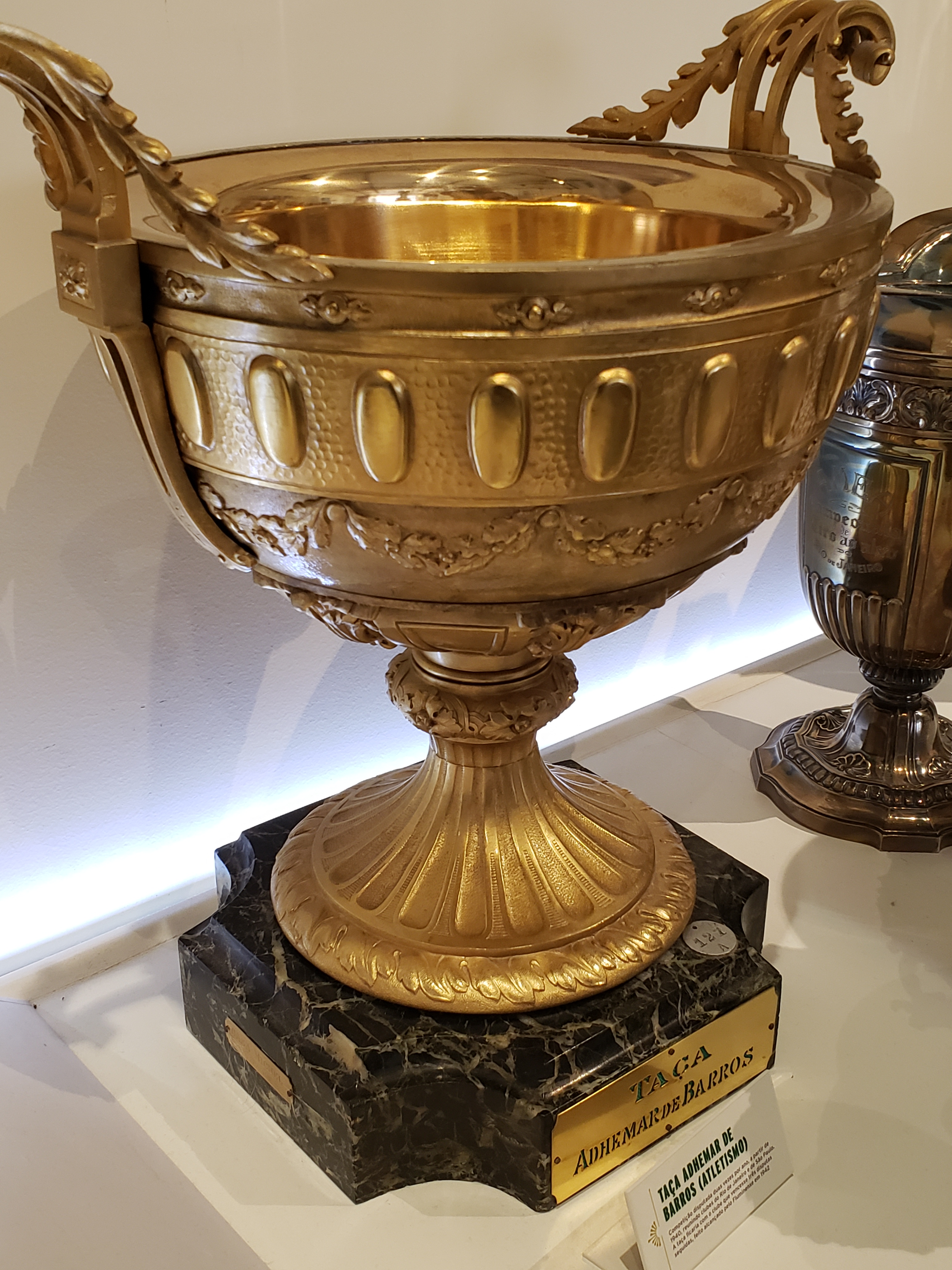 Taça Adhemar de Barros de Atletismo (RJx SP) ao clube que ganhasse essa competição interestadual realizada duas vezes por ano por três vezes consecutivas, conquistada definitivamente pelo Fluminense Football Club em 1942.